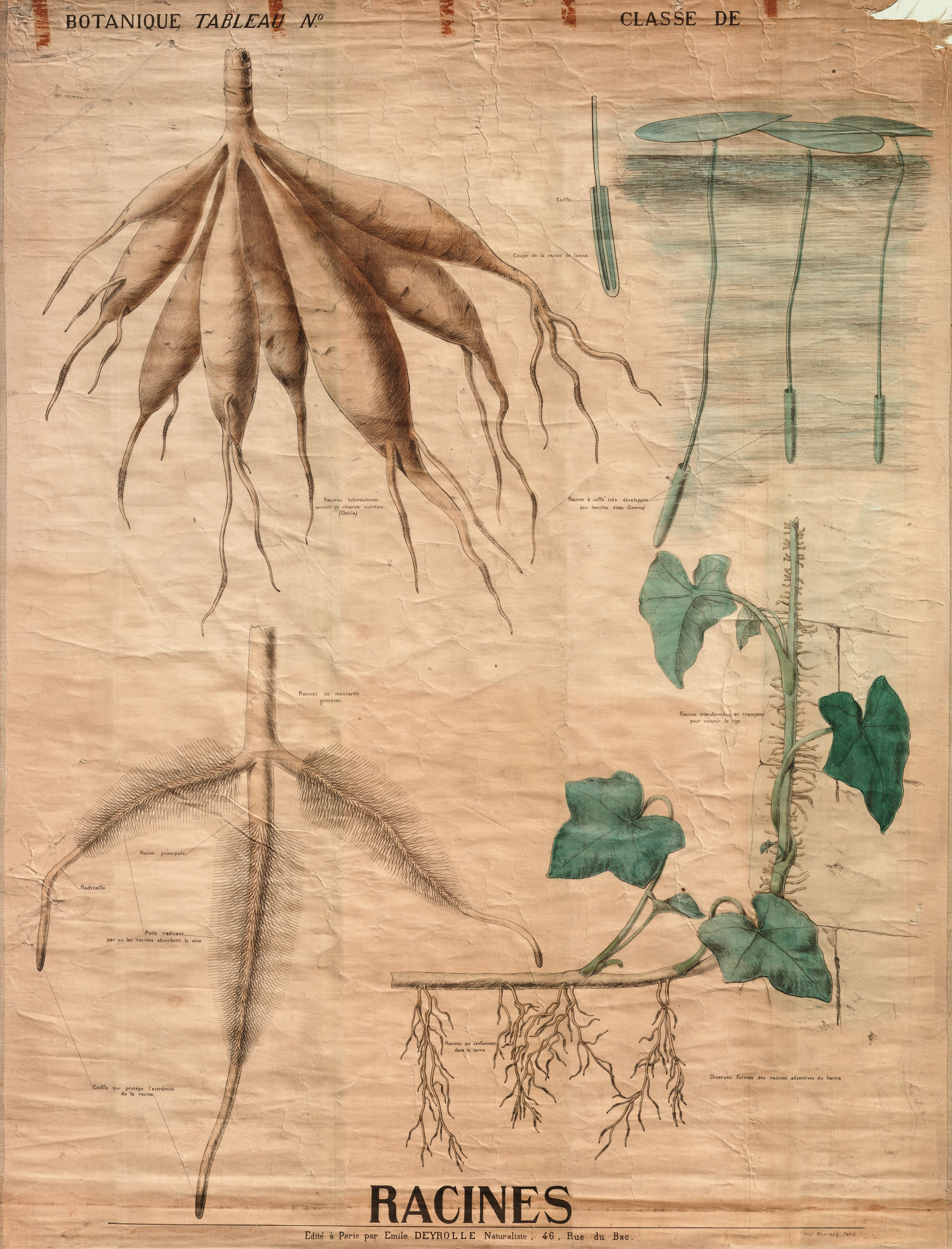 Racines. Bibliothèque Numérique de l'Université d'Artois. Retrieved on 25 March 2016.